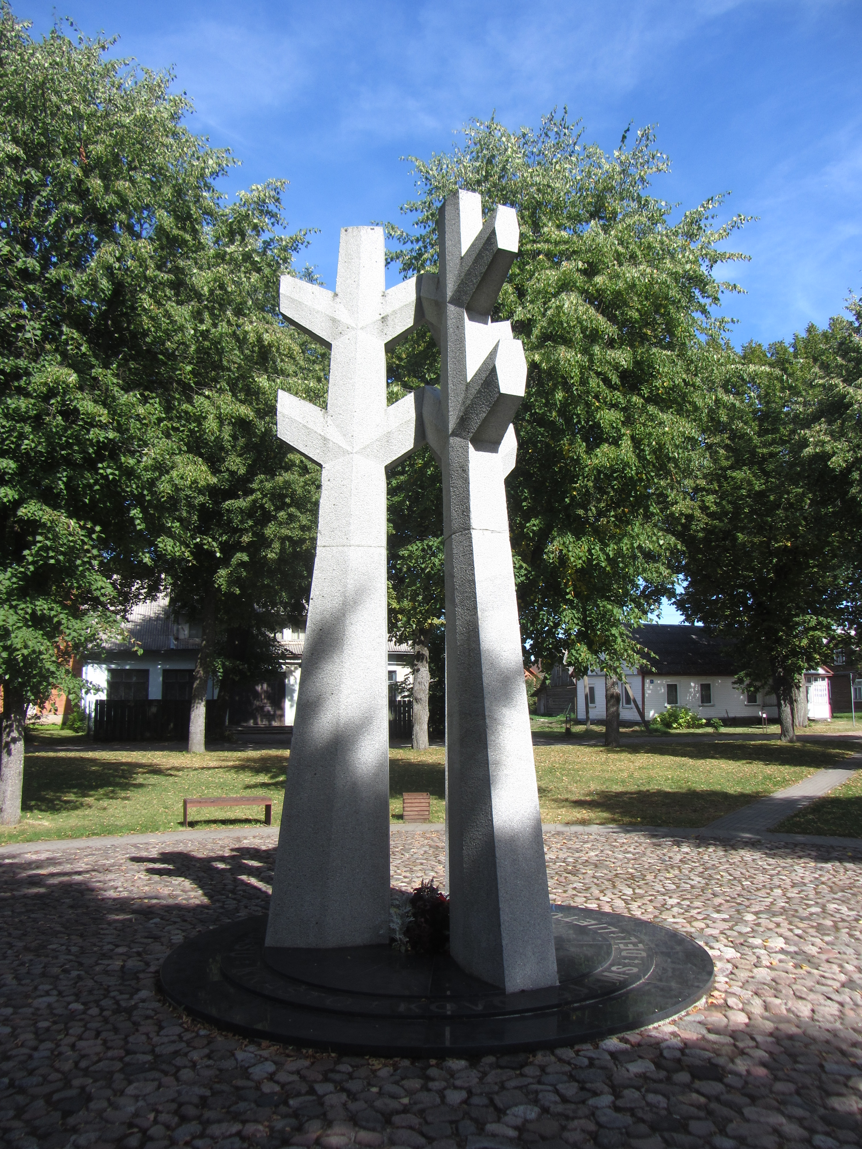 Svėdasai, Lithuania